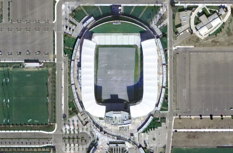 Homedepotcenter